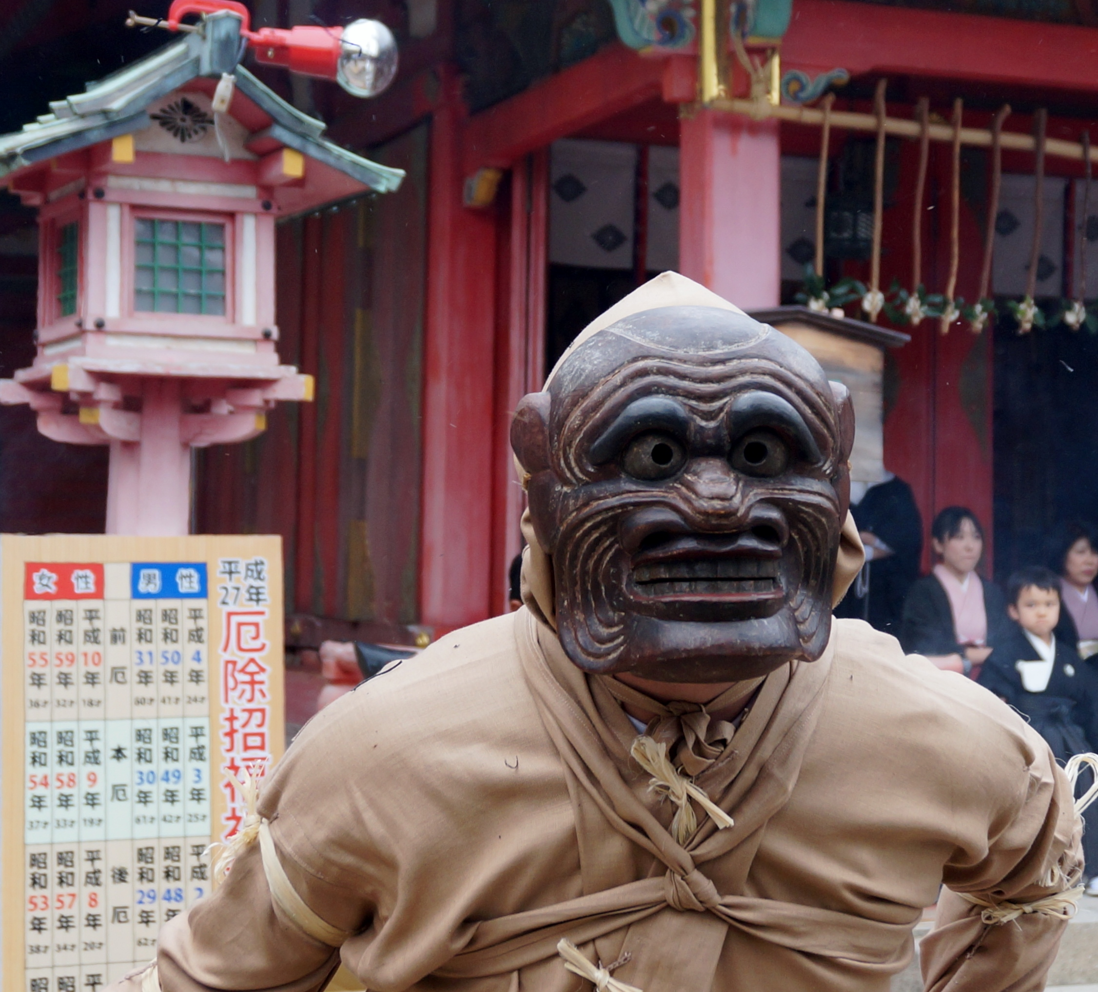 Uba oni (la vieille démone)